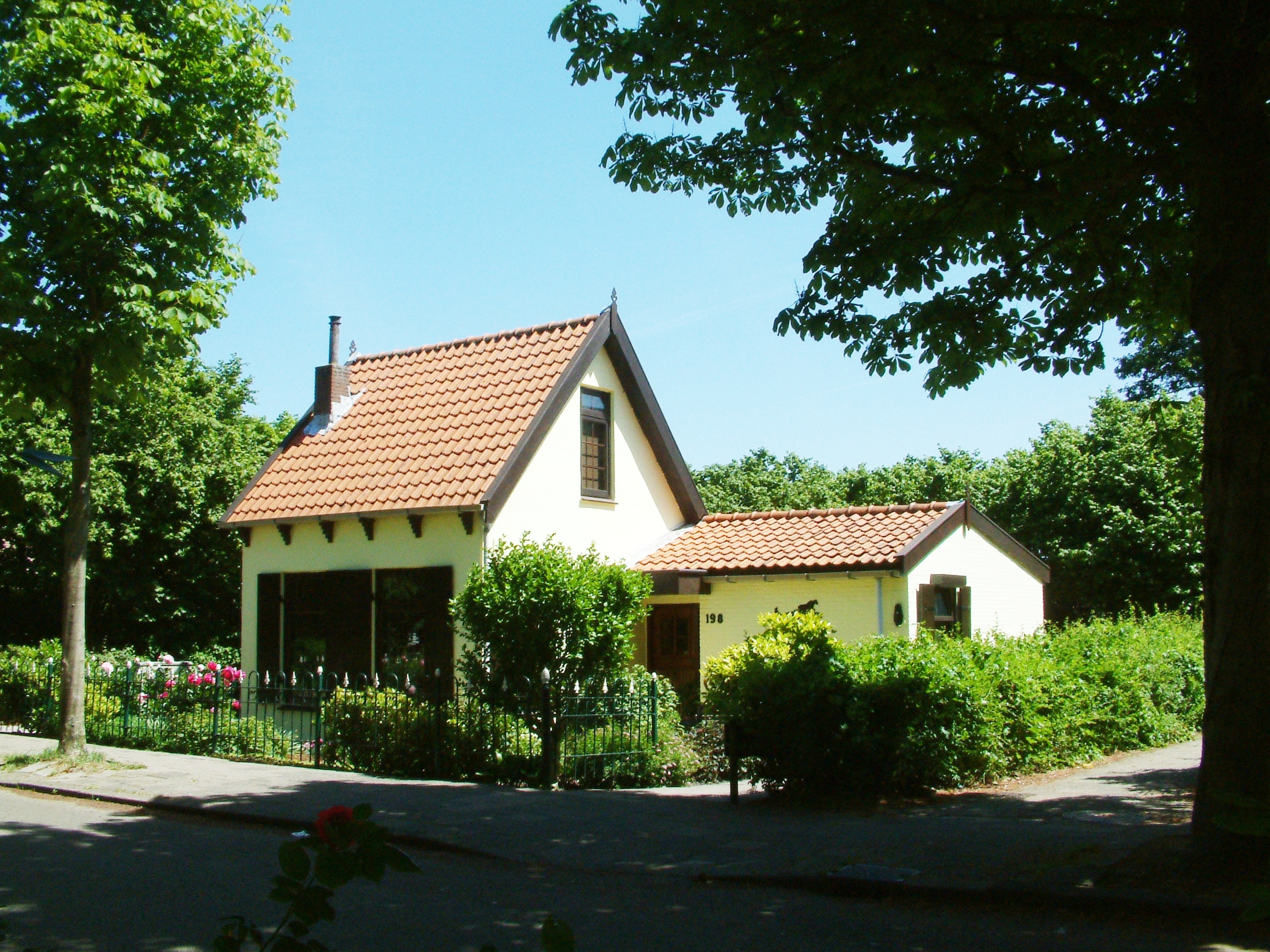 Bouwwerk in Zoetermeer